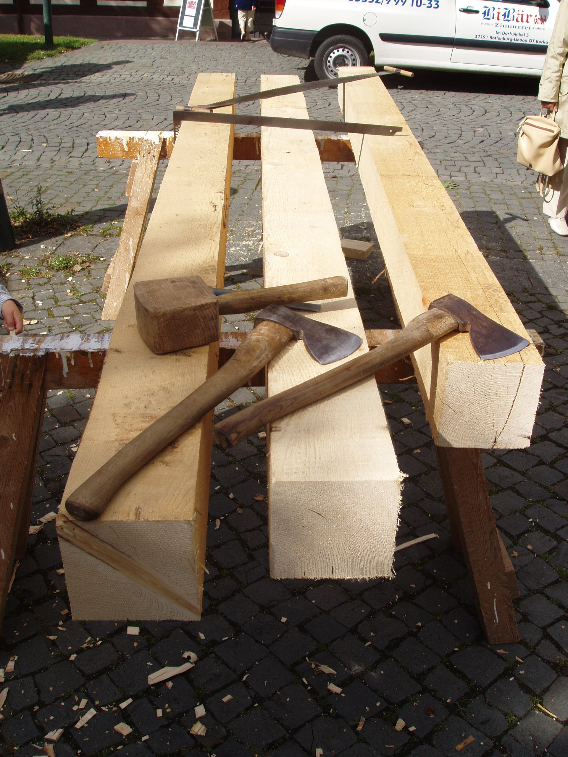 Balkenherstellung Fachwerk